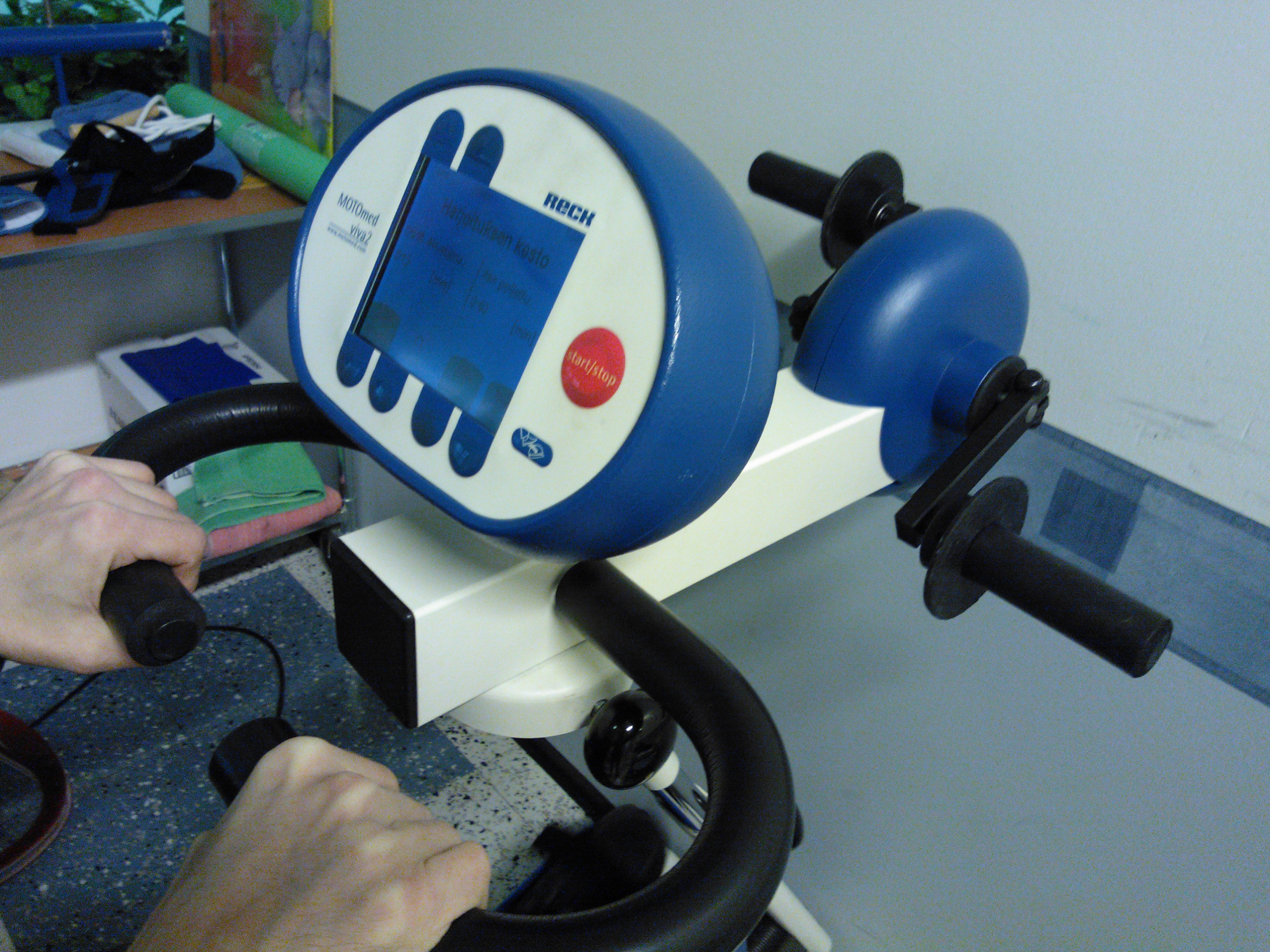 MOTOmed viva2 -harjoituslaitteen näyttöruutu ja käsikammet